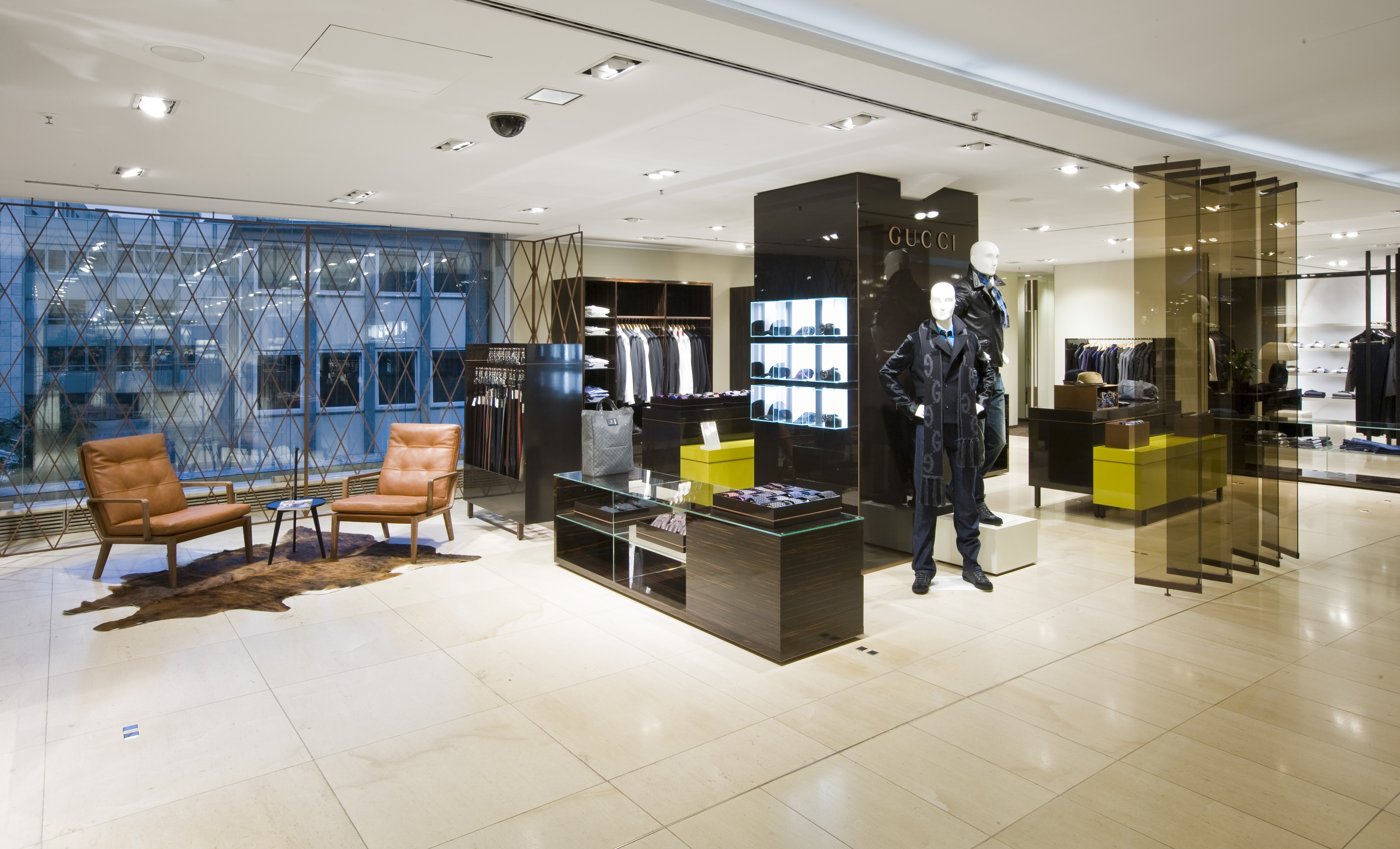 Breuninger Herrenexquisit-Abteilung in Stuttgart